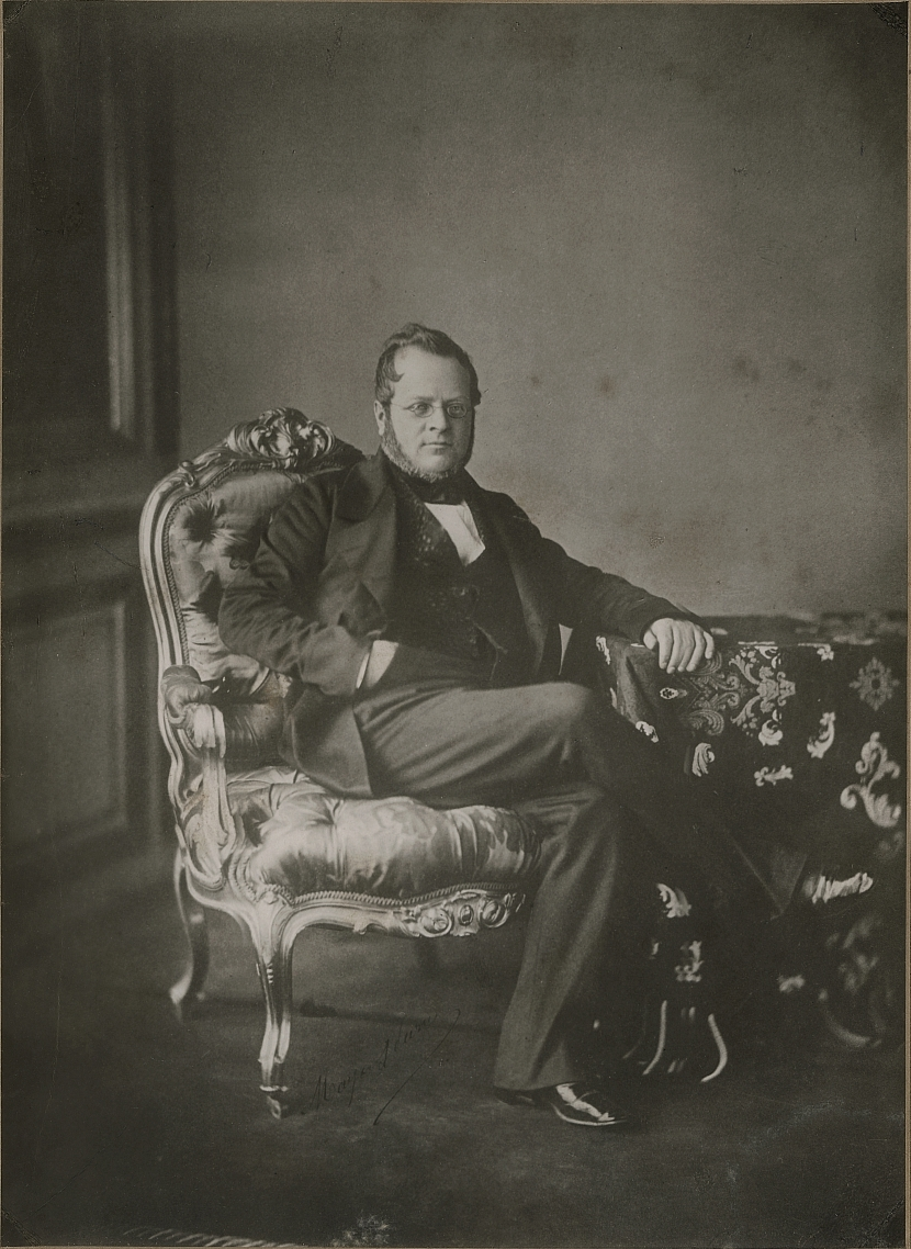 Fotografie byla součástí výstavy: Kontroverze Právní a etická historie fotografie Výstavu připravilo Musée de l’Elysée, Lausanne Léopold-Ernest Mayer (1822-1895) a Pierre-Louis Pierson (1822-1913) Portrét hraběte de Cavour, 1856 Fotografie na albuminovém papíru Musée de l’Élysée, Lausanne Léopold-Ernest Mayer (1822-1895) and Pierre-Louis Pierson (1822-1913) Portrait of the Count of Cavour, 1856 Musée de l’Élysée, Lausanne